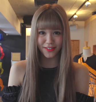 紗蘭です。